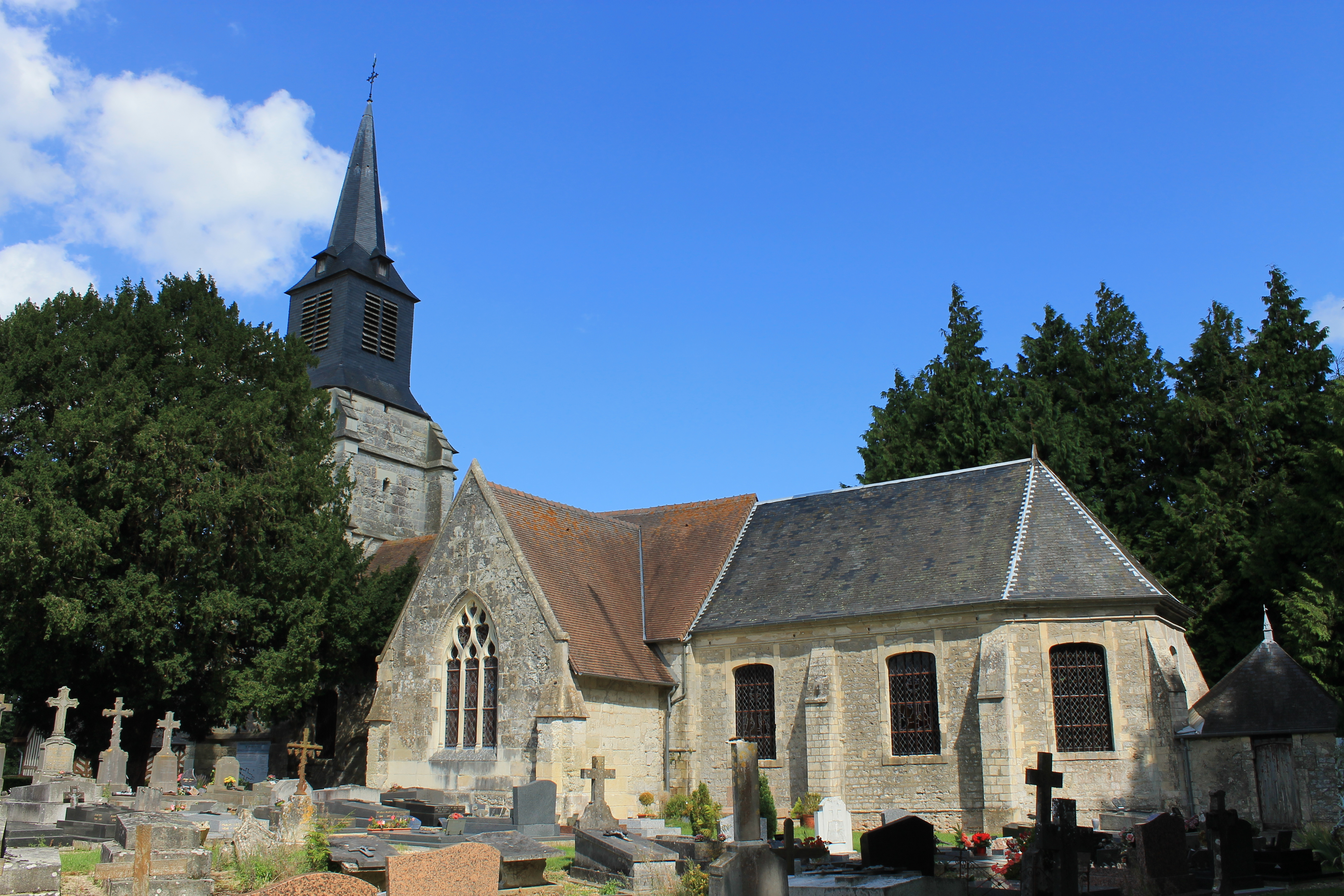 Église Saint-Martin à Bourgeauville (Calvados)